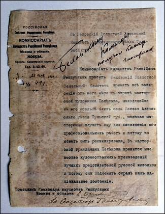 Документ о передаче земли художнику Поленову